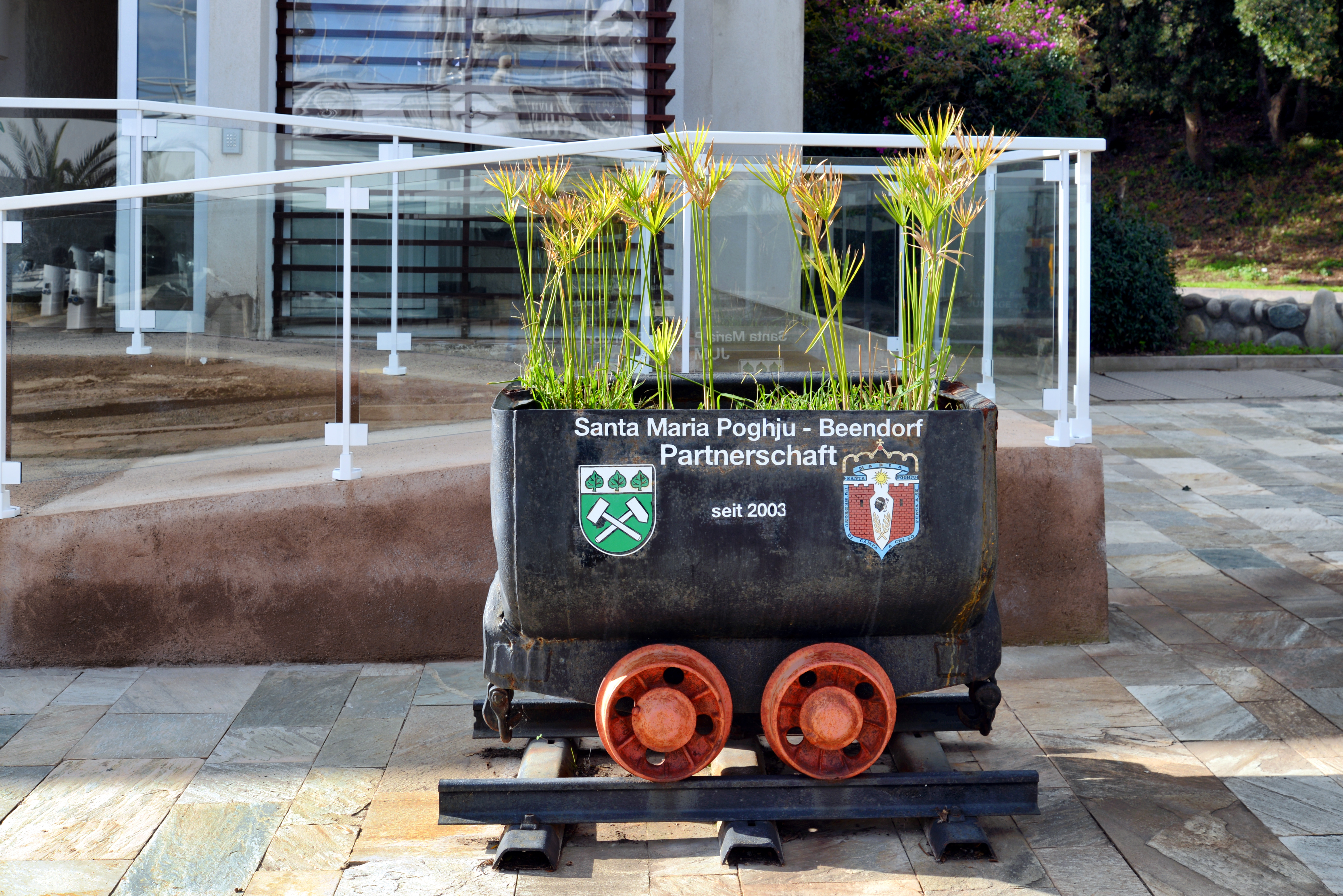 Santa-Maria-Poggio, Costa Verde (Corse) - Jumelage avec Beendorf